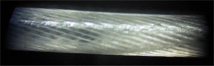 Tennissaite Prince Synthetic Gut Duraflex (Mikroskopieaufnahme)